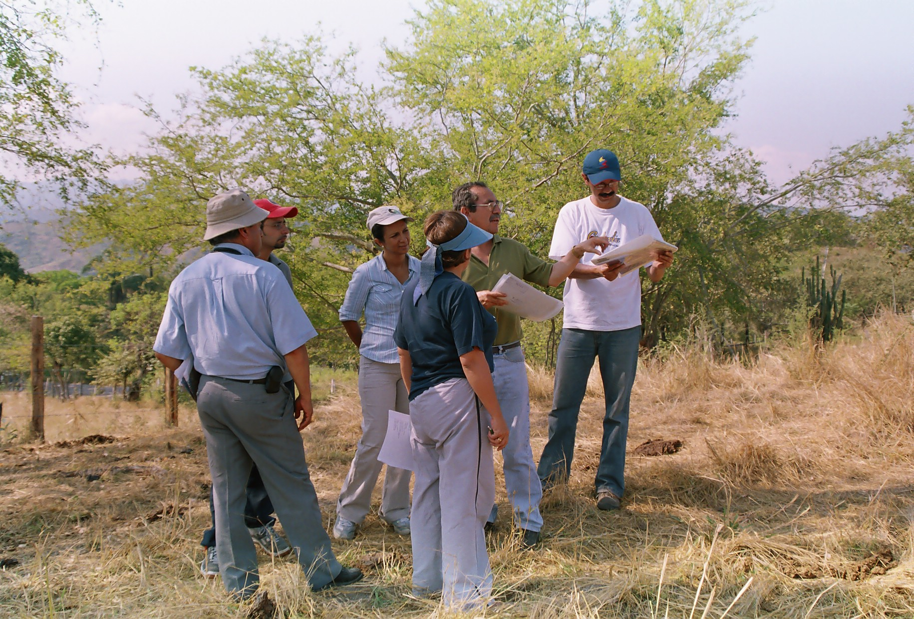 Equipe de travail sur le terrain - Colimbie